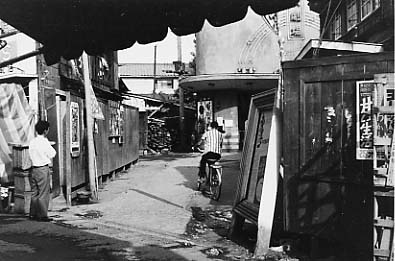 松戸松竹館こと松戸映画劇場を中通り（現在のふれあい通り）から見る（1960年）。